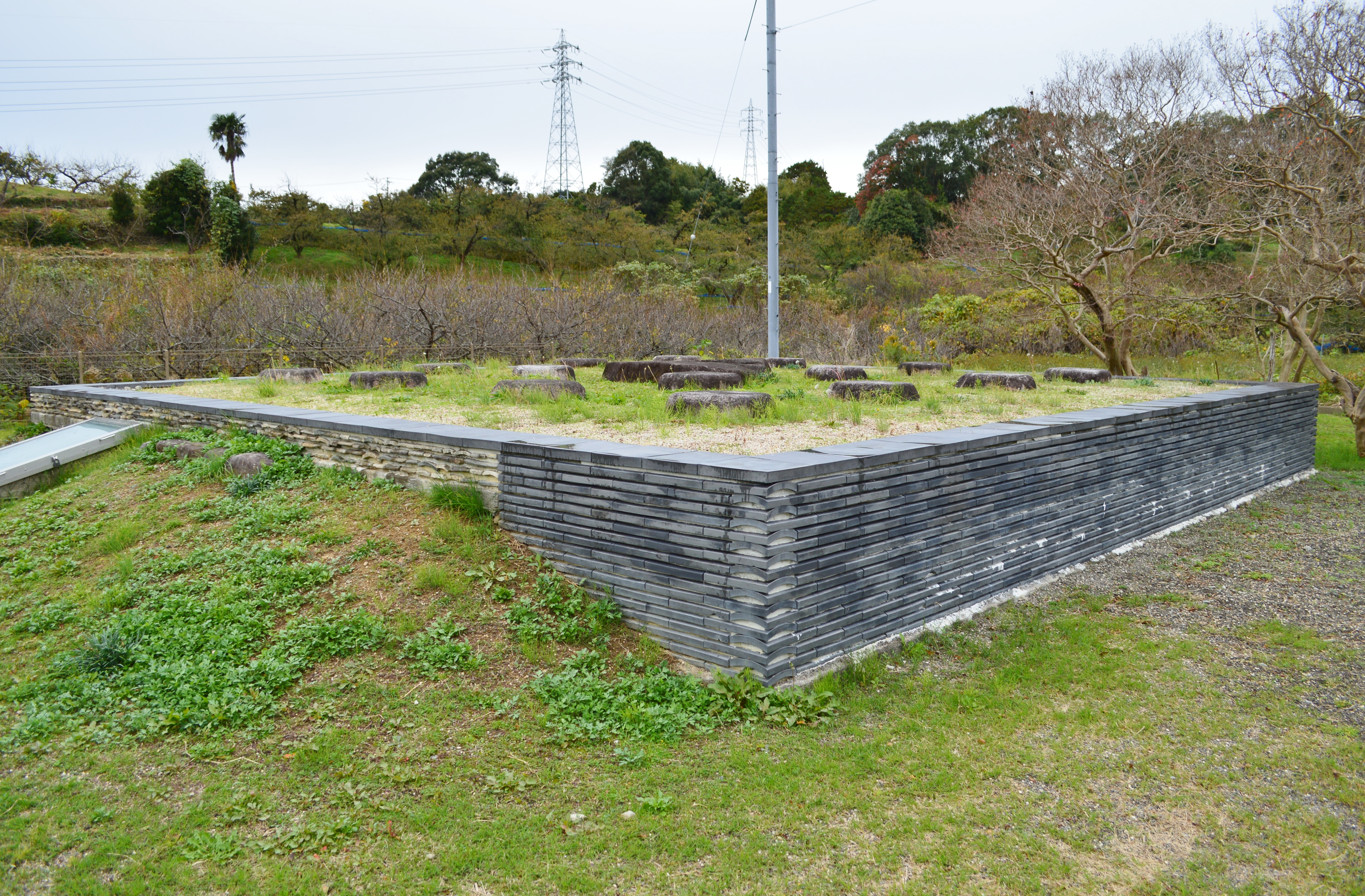 三栖廃寺跡 塔